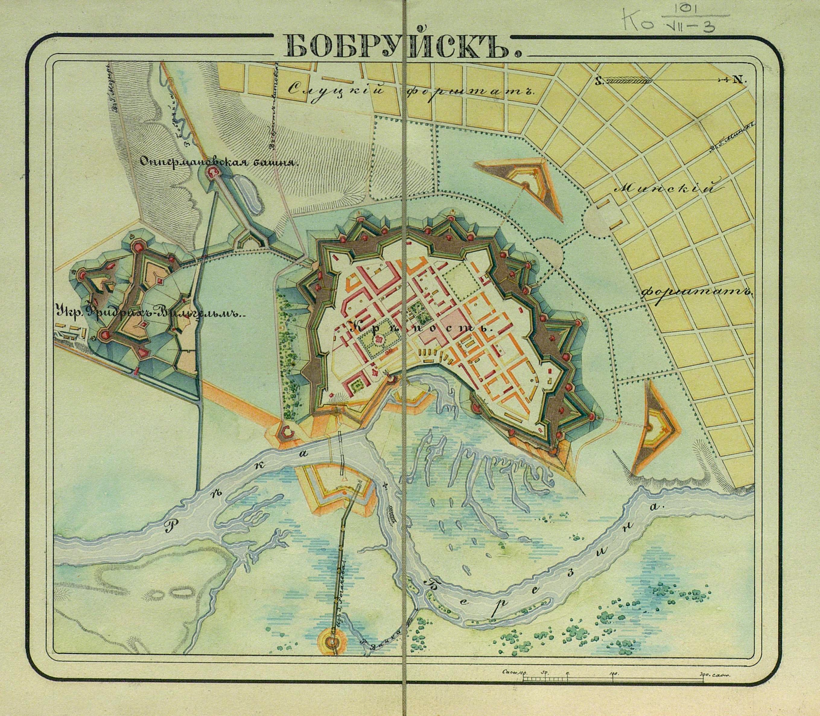 Бобруйск.